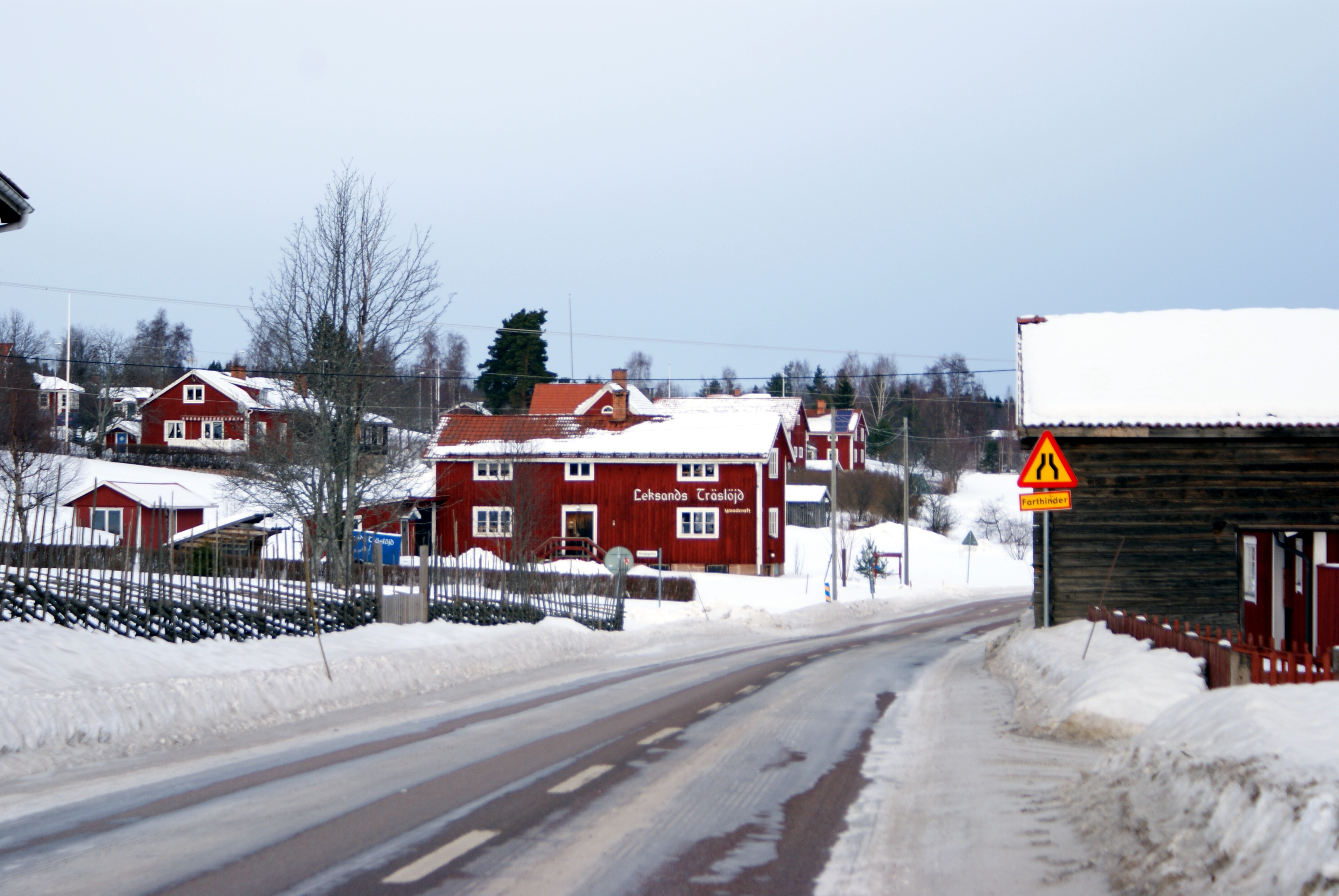 Västanvik i Leksands kommun.